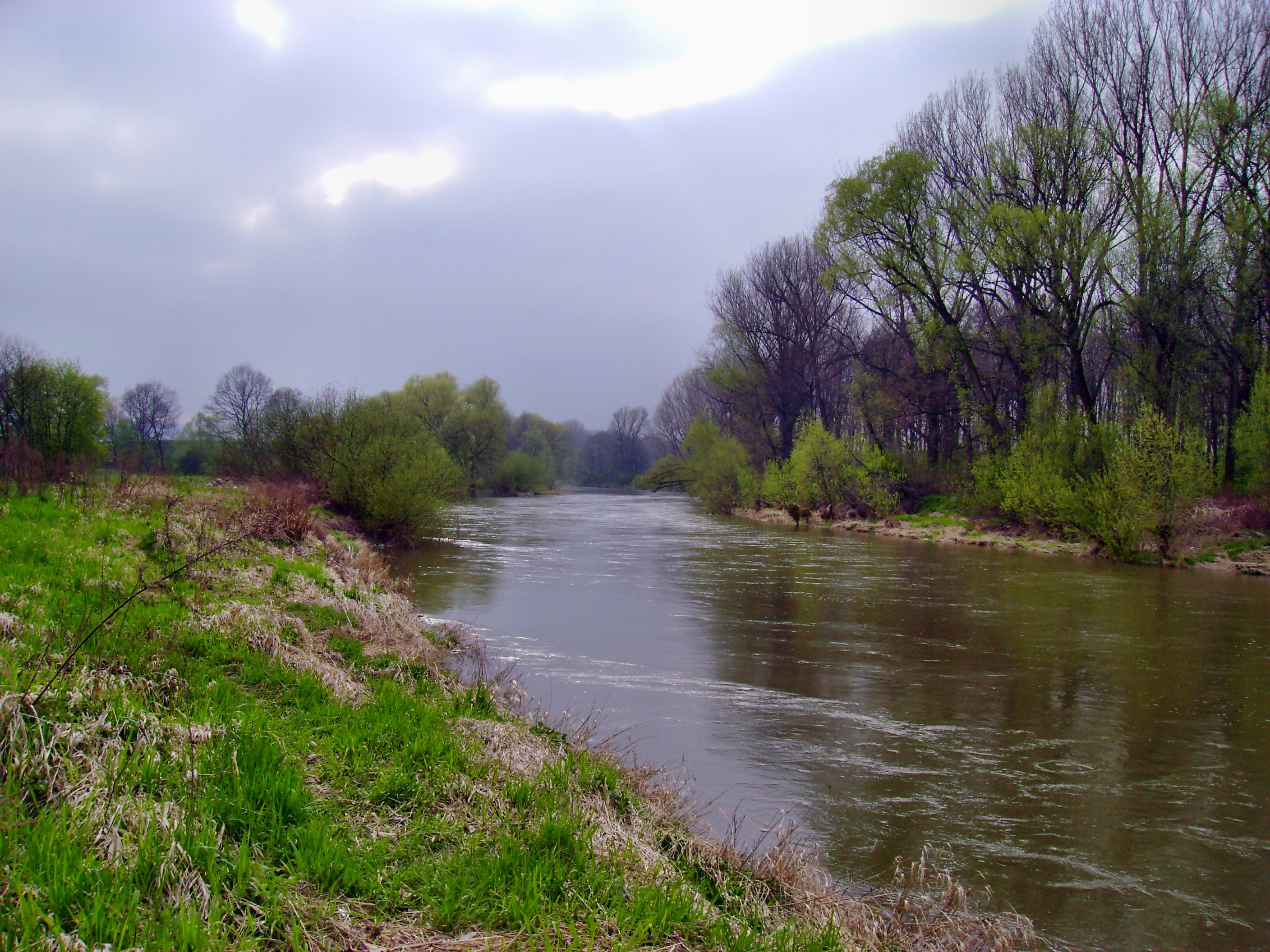 Stary Paczków - Nysa Szalona